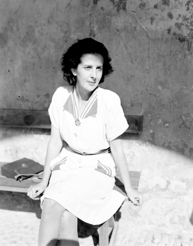 Degenschild, Beatrix auf einer Bank vor einer Mauer beim Festspielhaus während der Salzburger Festspiele 1947.